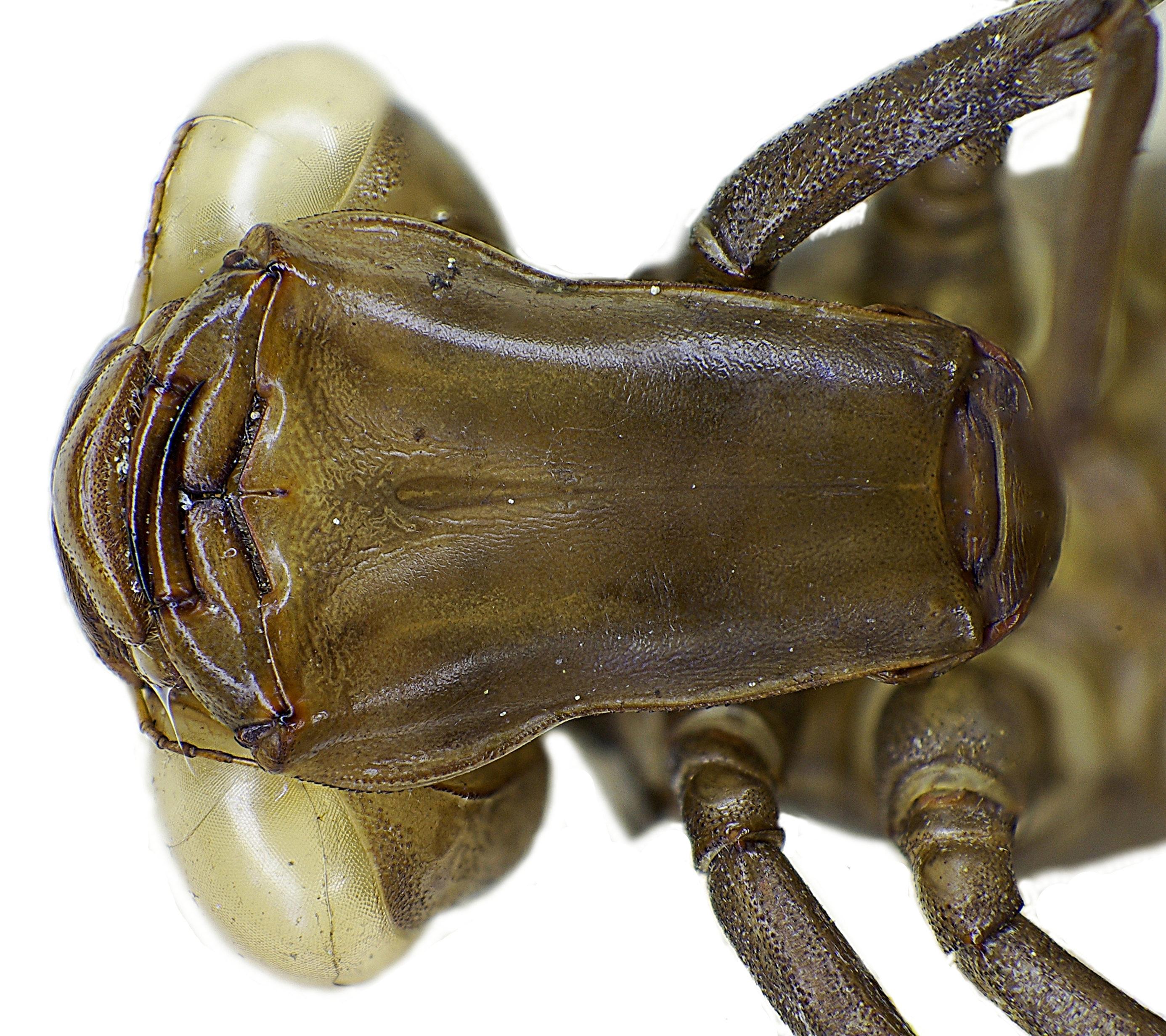 Fangmaske (von unten) von Exuvie von Aeshna juncea